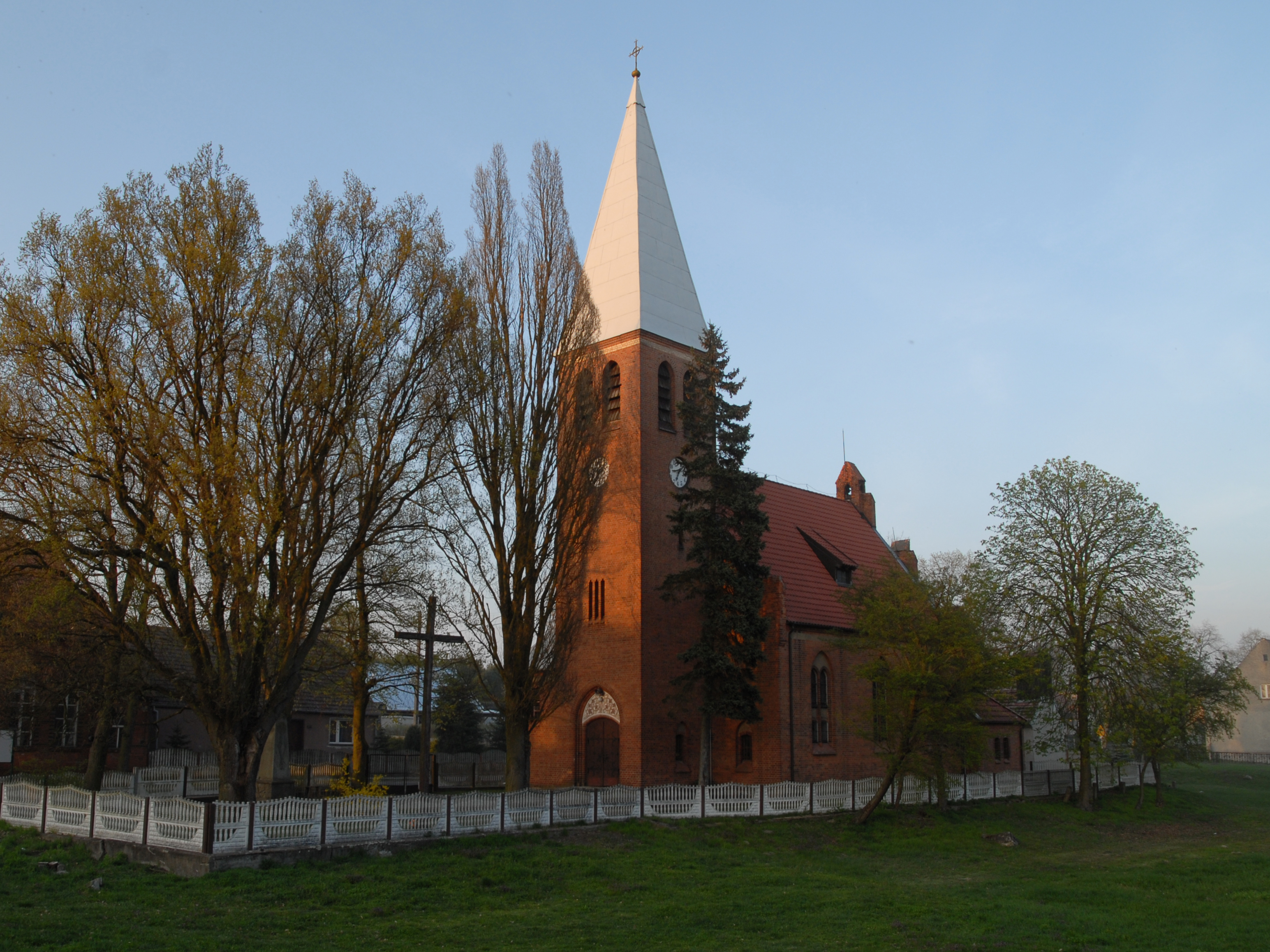 Kościół p.w. św. Ludwika w Namyślinie, gm. Boleszkowice, pow. myśliborski, woj. zachodniopomorskie